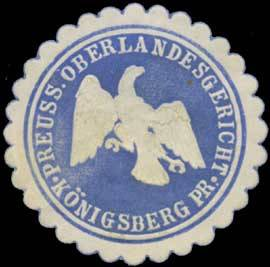 Siegelmarke des Oberlandesgerichts Königsberg. Der Wappenadler wurde zwischen 1921 und 1933 verwendet.